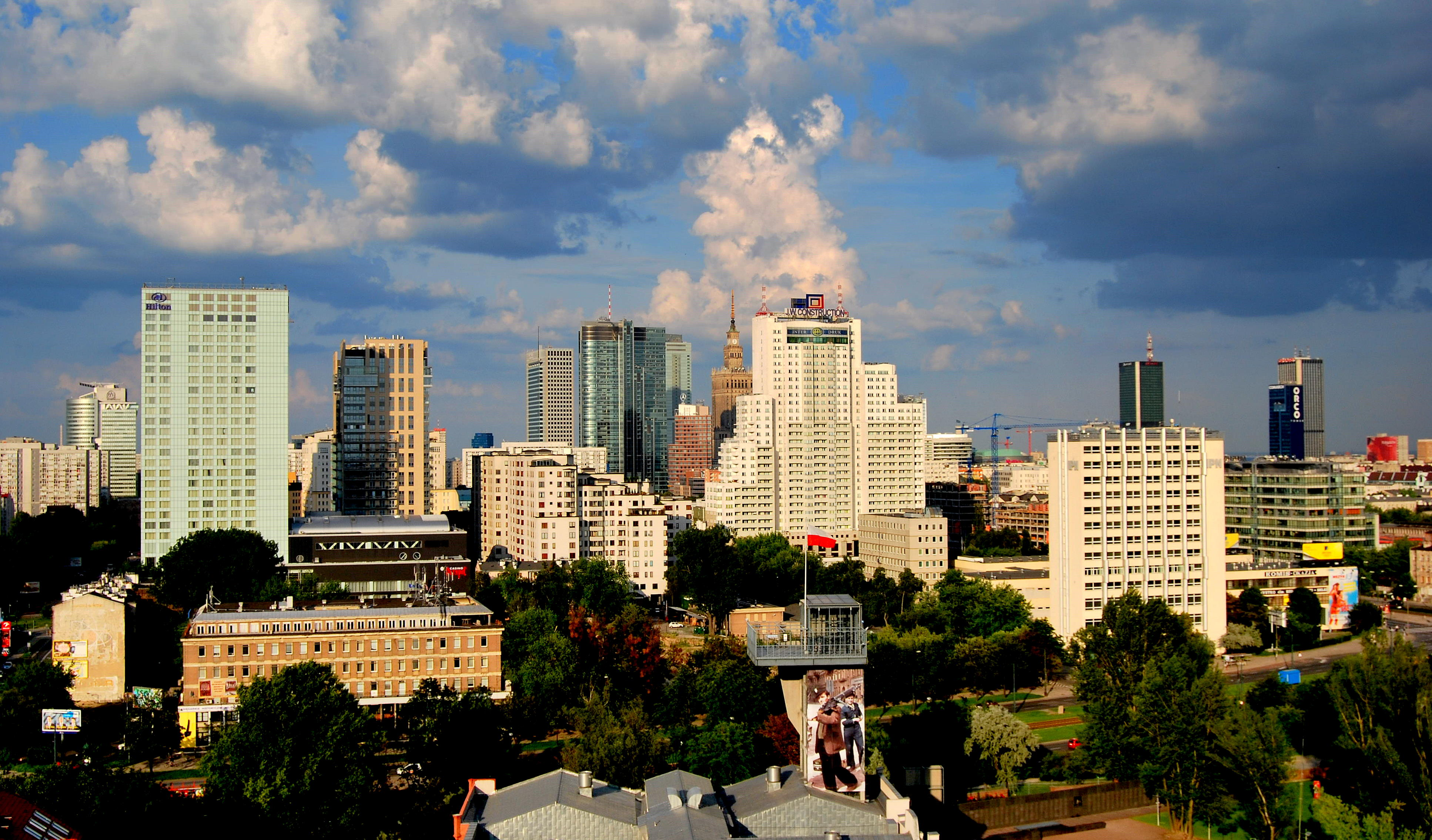 Panorama Warszawy z dachu dawnej fabryki lamp neonowo - rtęciowych im. Róży Luksemburg